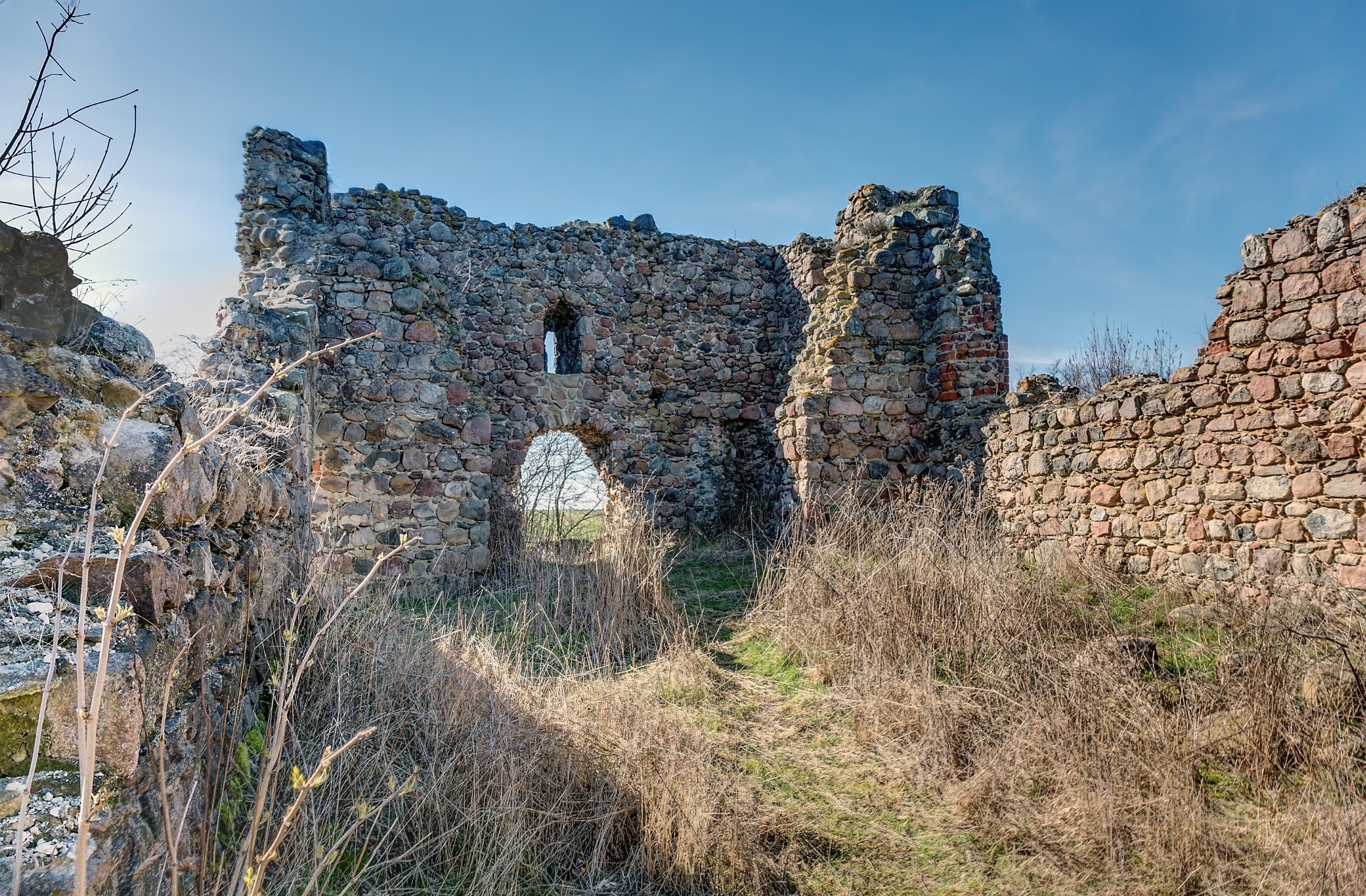 Wüste Kirche Rittgarten, Blick auf die Westseite der Ruine